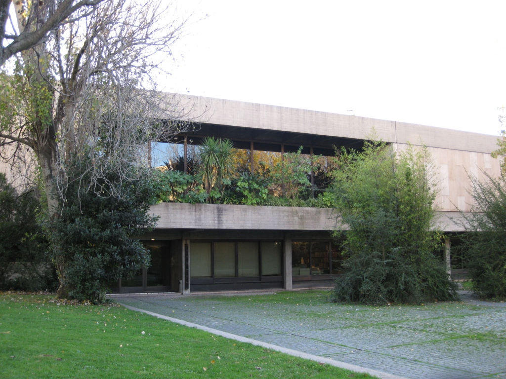 թանգարանի ընդհանուր տեսքը